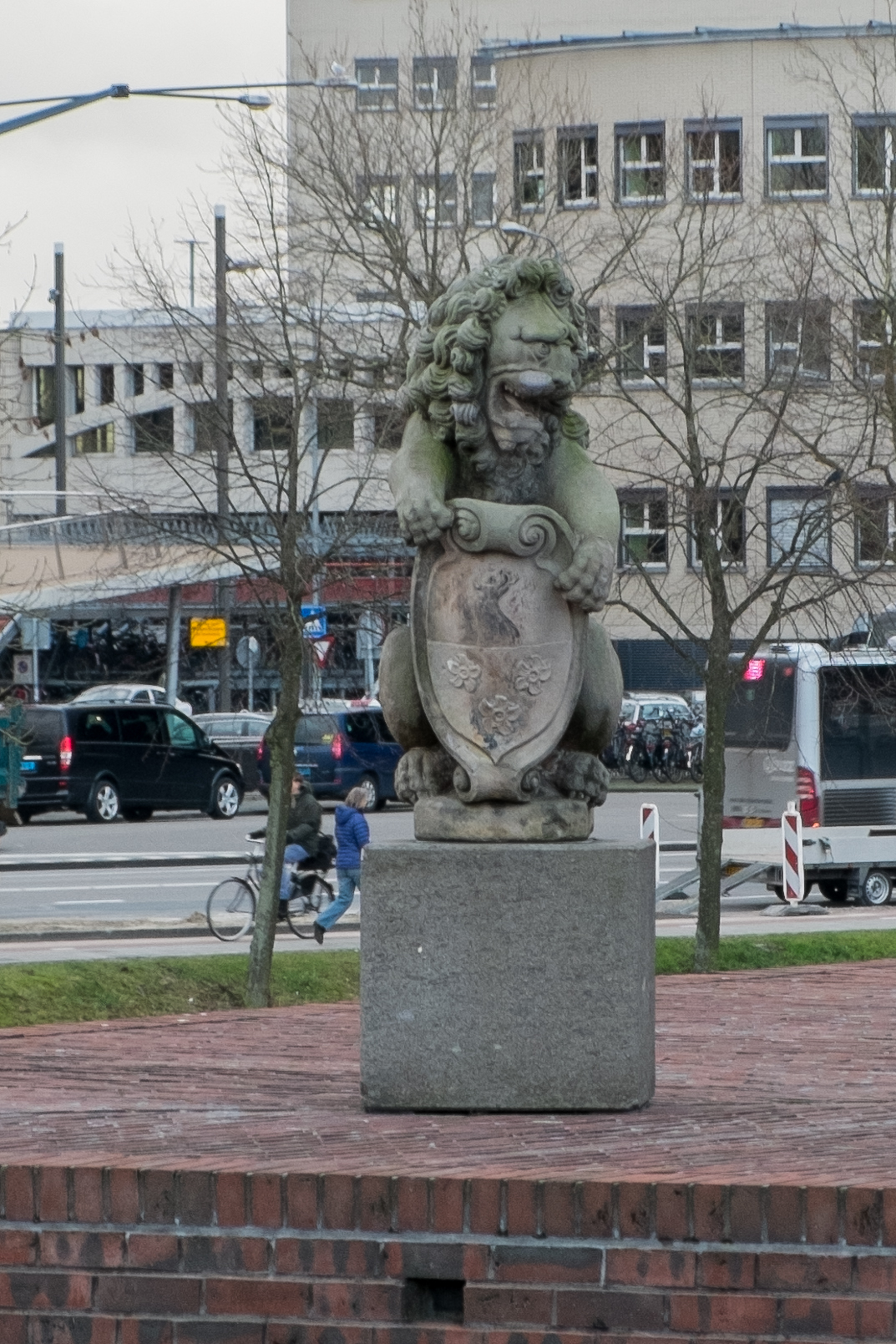 Een van de twee schilddragende leeuwen op het paviljoen voor de regionale geschiedenis van het Groninger Museum. Afkomstig van het in 1811 afgebroken Huis te Farmsum, stonden de beide leeuwen vervolgens ruim een eeuw bij de Drentse havezathe Oosterbroek, alvorens ze in 1925 aan het museum werden geschonken. Sinds 1994 staan ze op hun huidige plek.